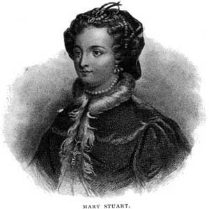 Мария Стюарт Портрет Марии Стюарт